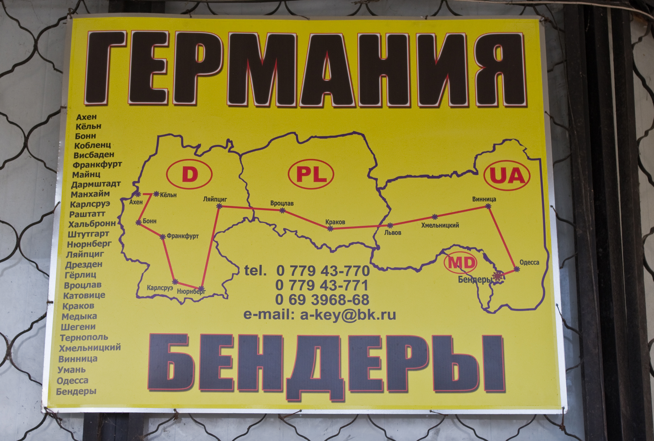 Рейс Бендеры-Германия